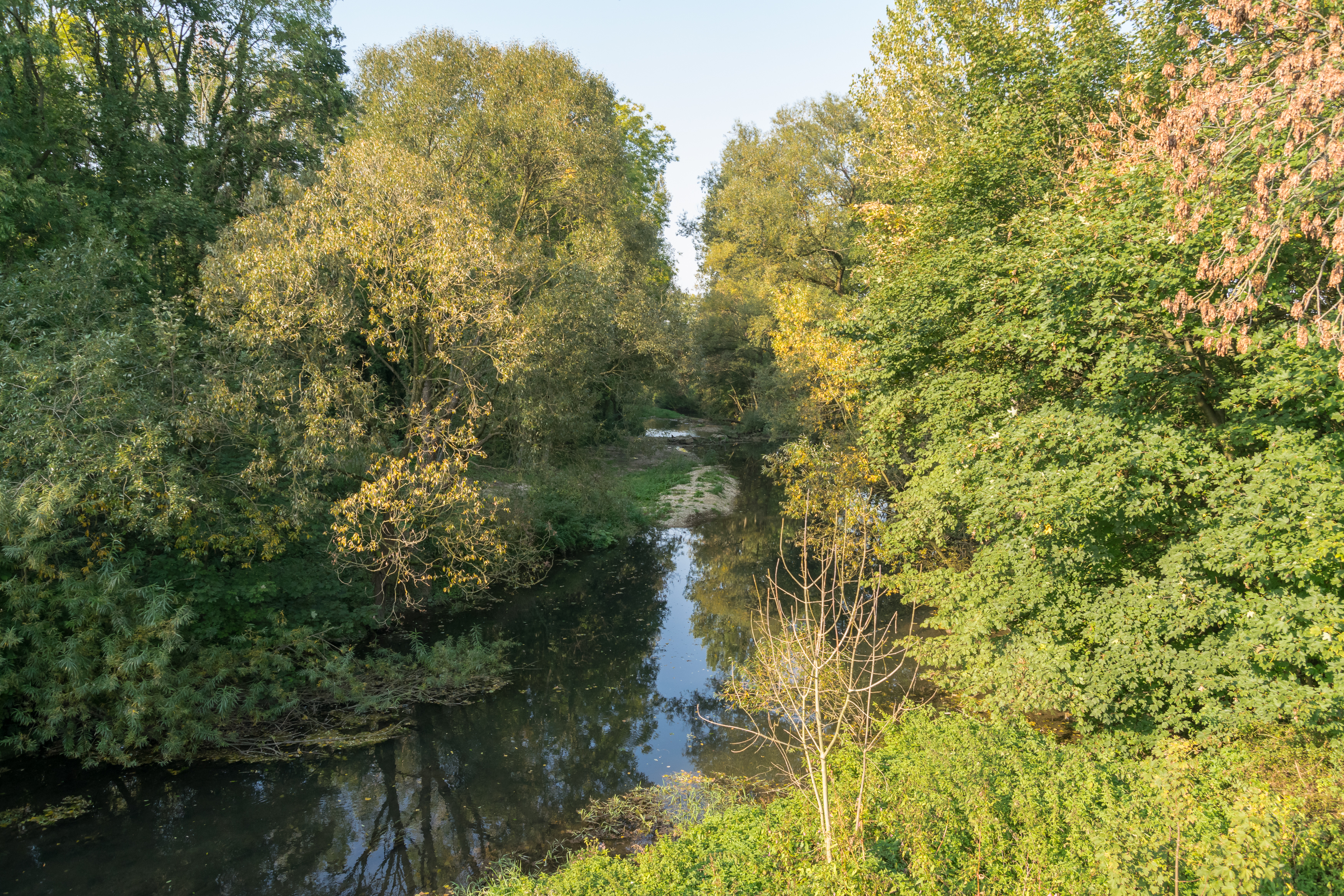 Alme westlich von Paderborn im Landschaftsschutzgebiet "Fließgewässer und Auen"